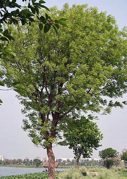 Spanish Mahogany Swietenia mahagoni in Kolkata, West Bengal, India.